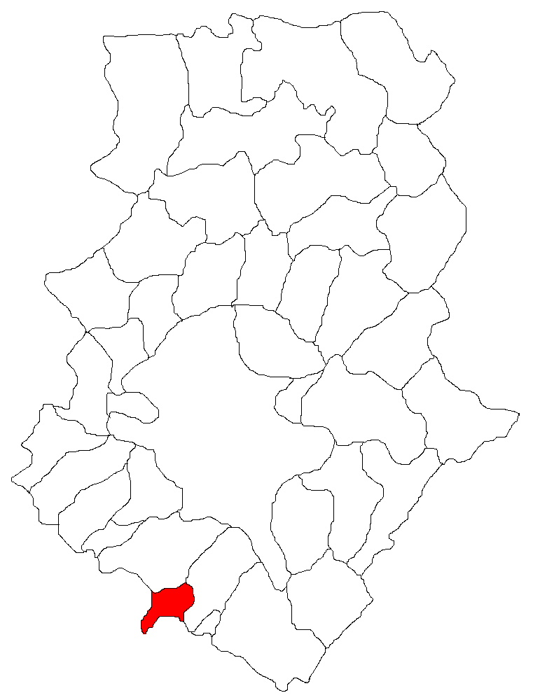 Categorie:Hărţi ale judeţului Ilfov